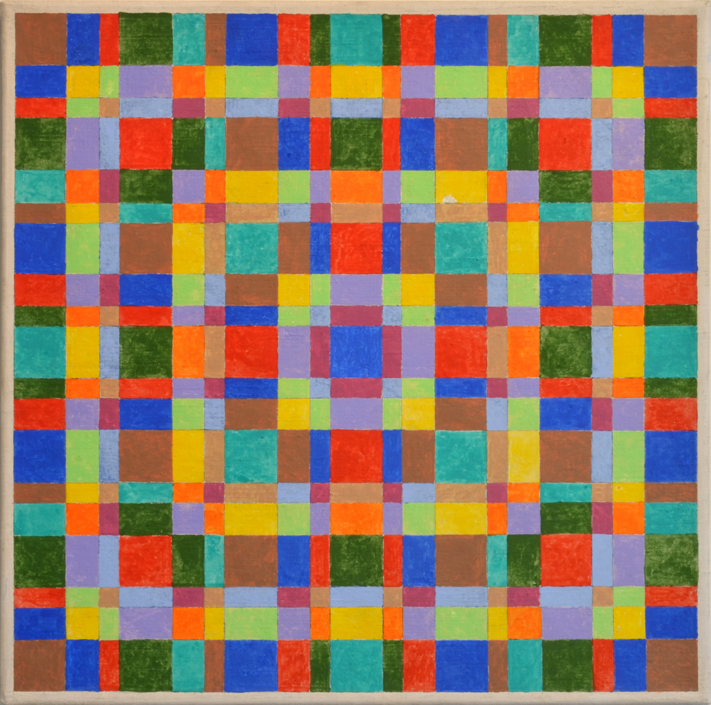 Jiří Mrázek, Ohníčky, olej, akryl, 55x55 cm, 2005, Museum Kampa